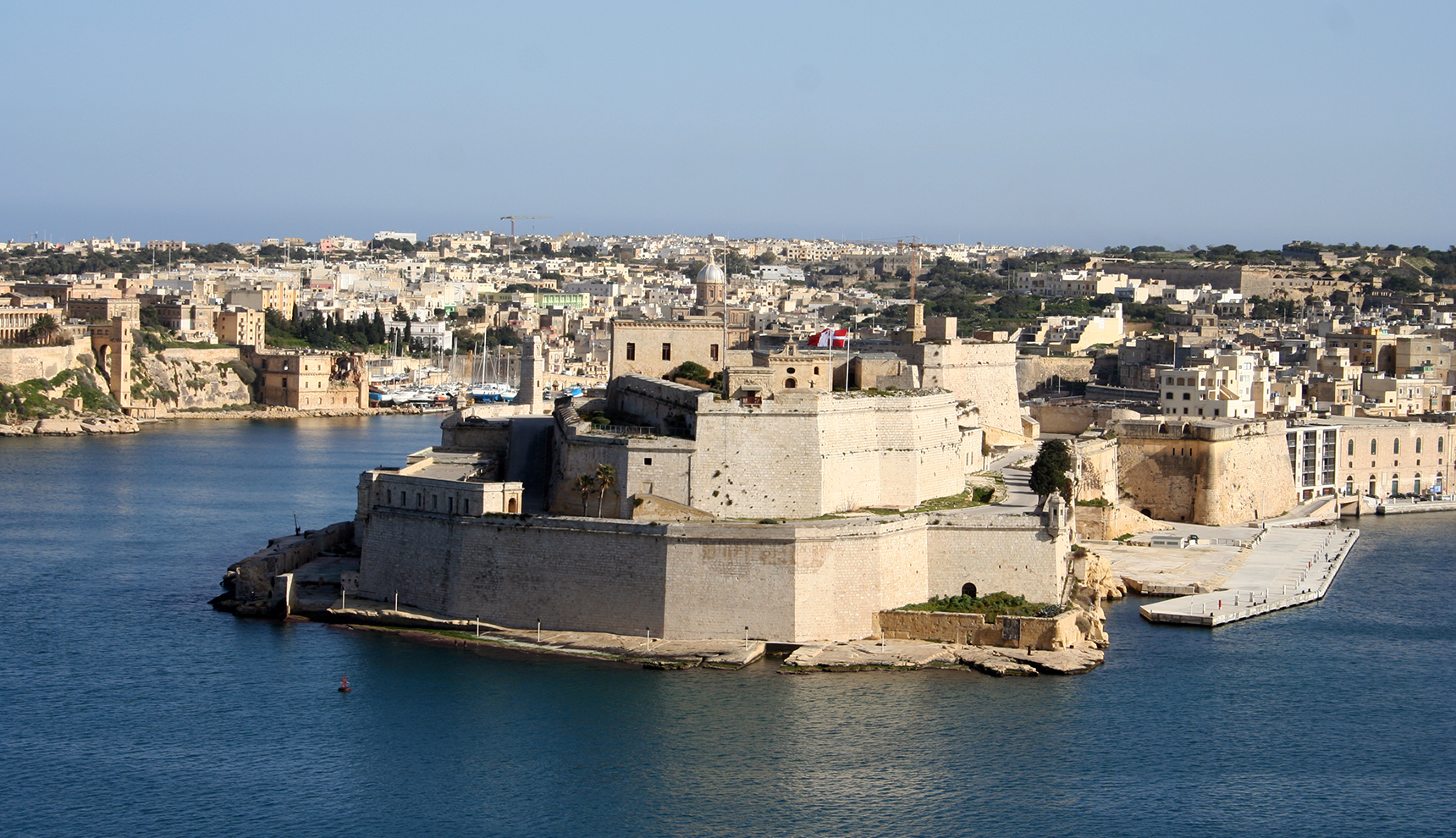 Malta, Birgu, Fort St. Angelo (seen from Valletta)